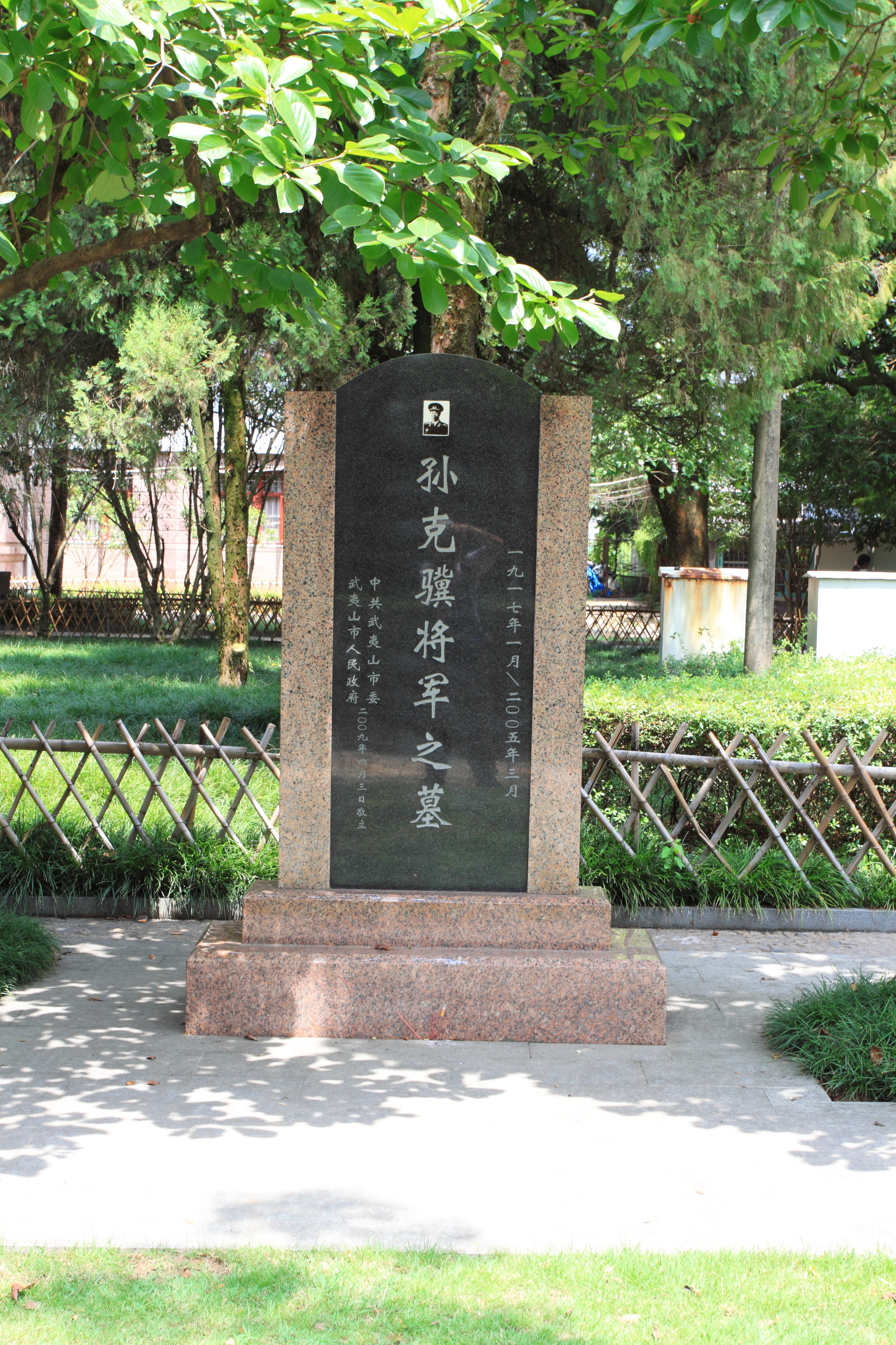 列宁公园，位于中国福建省武夷山市。